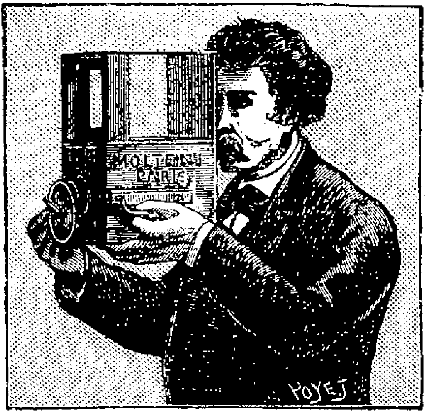 Appareil Molteni